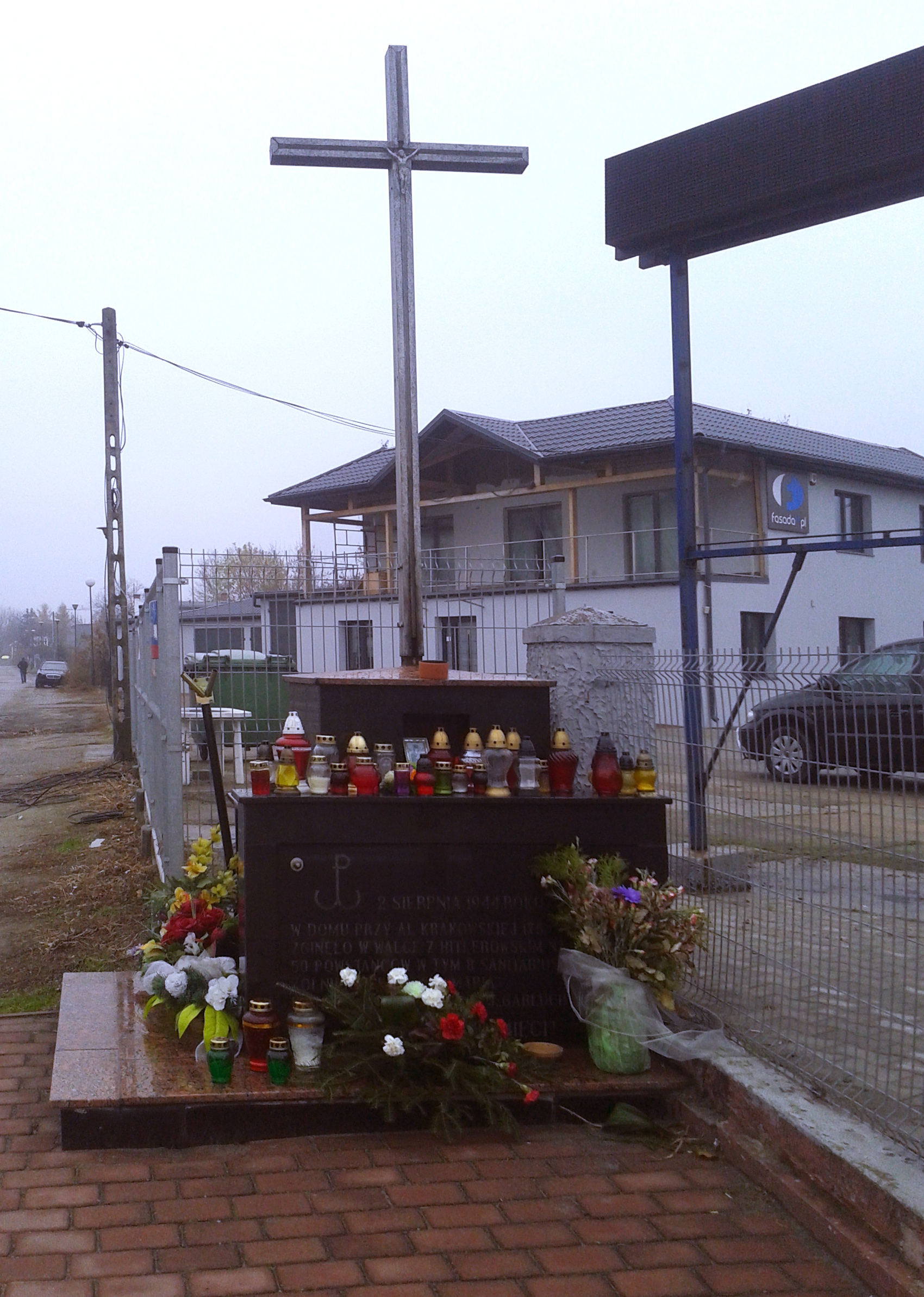 Krzyż na al. Krakowskiej 175 (róg ul. Lipowczana) w Warszawie upamiętniający poległych 50 powstańców, w tym 8 sanitariuszek z III kompanii „Maria” 7pp AK „Garłuch”